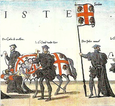 Guion y caballo engualdrapado con el emblema heráldico del Reino de Cerdeña en las exequias por la muerte de Carlos I de España y V como emperador del Sacro Imperio Romano-Germánico. Calcografía coloreada. Fuente: Alberto Montaner Frutos, El señal del rey de Aragón: Historia y significado, Zaragoza, Institución «Fernando el Católico», 1995, p. 185, LÁM. XVII. ISBN 84-7820-283-8.